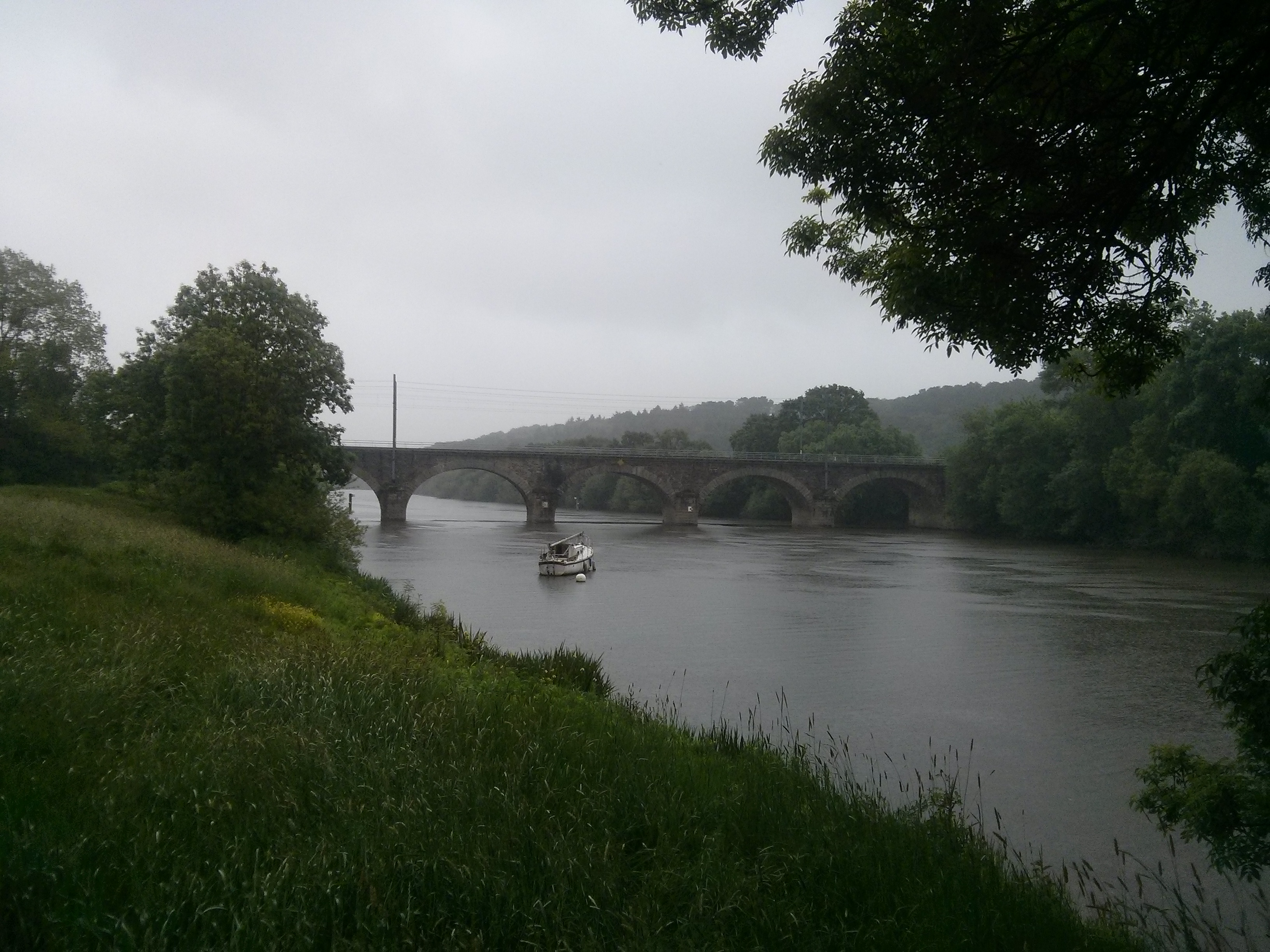 Pont ferroviaire sur la Vilaine à Langon .